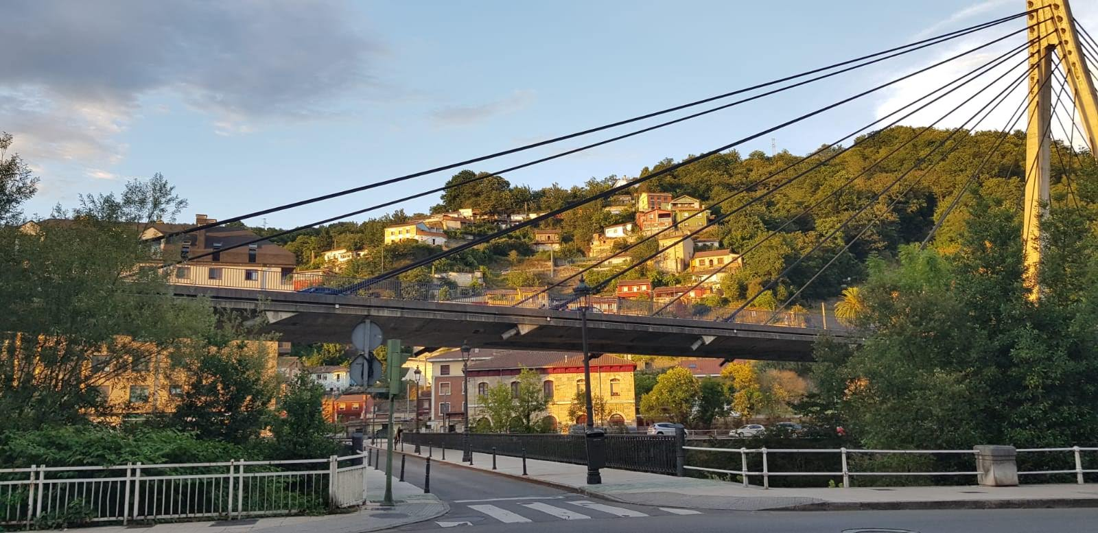 Casas colgadas entre La Felguera y Sama; y puente atirantado sobre el río Nalón (Langreo, Asturias, España)